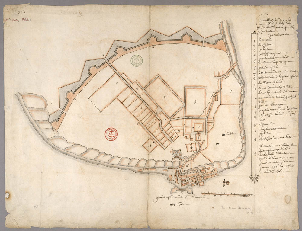 Véritable plan de Québec comme il est en l'an 1664 et les fortifications que l'on puise faire, [Bourdon], 1664. FR CAOM 3DFC 342B